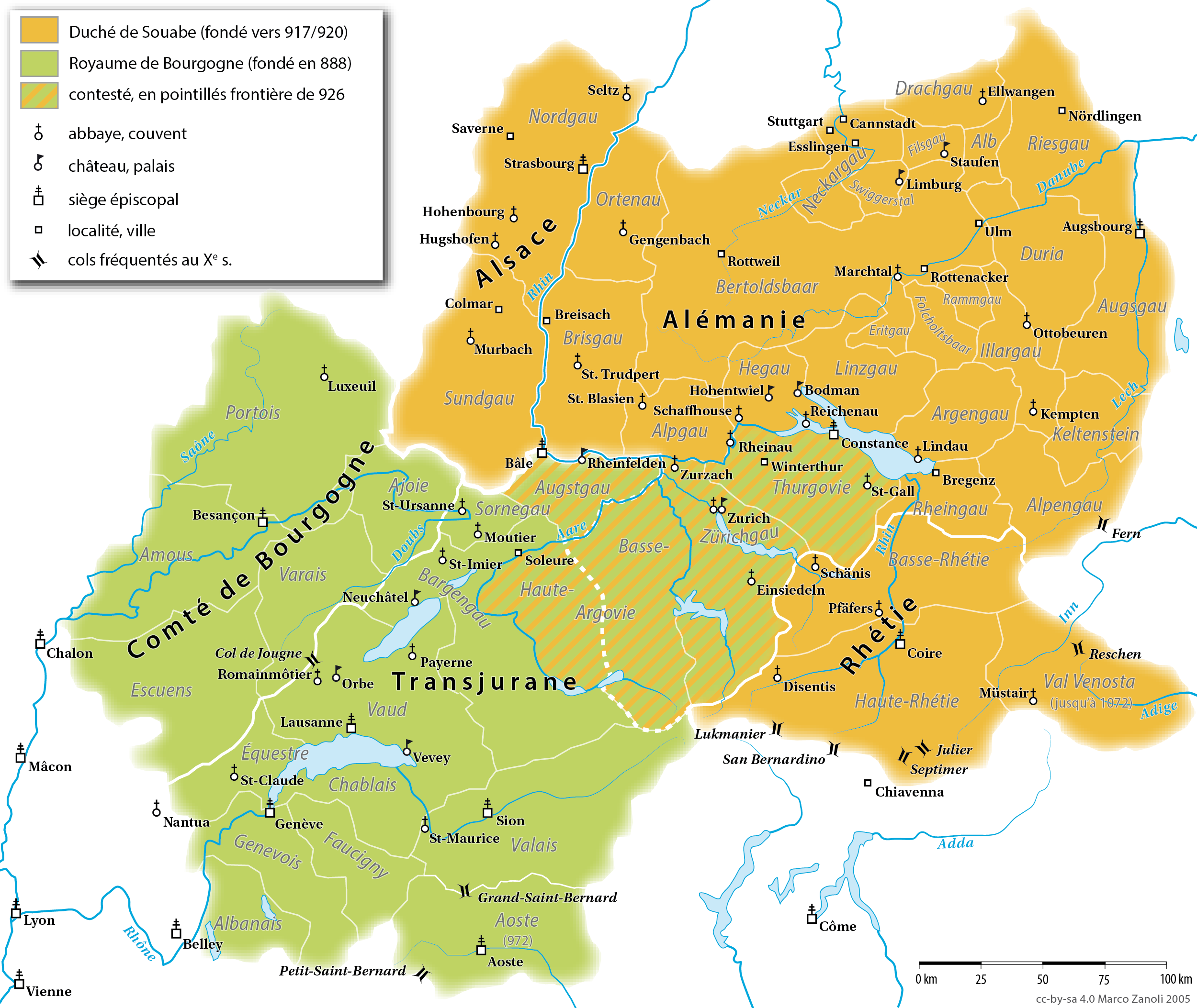 Le duché de Souabe et le royaume de Haute-Bourgogne durant le dixième siècle